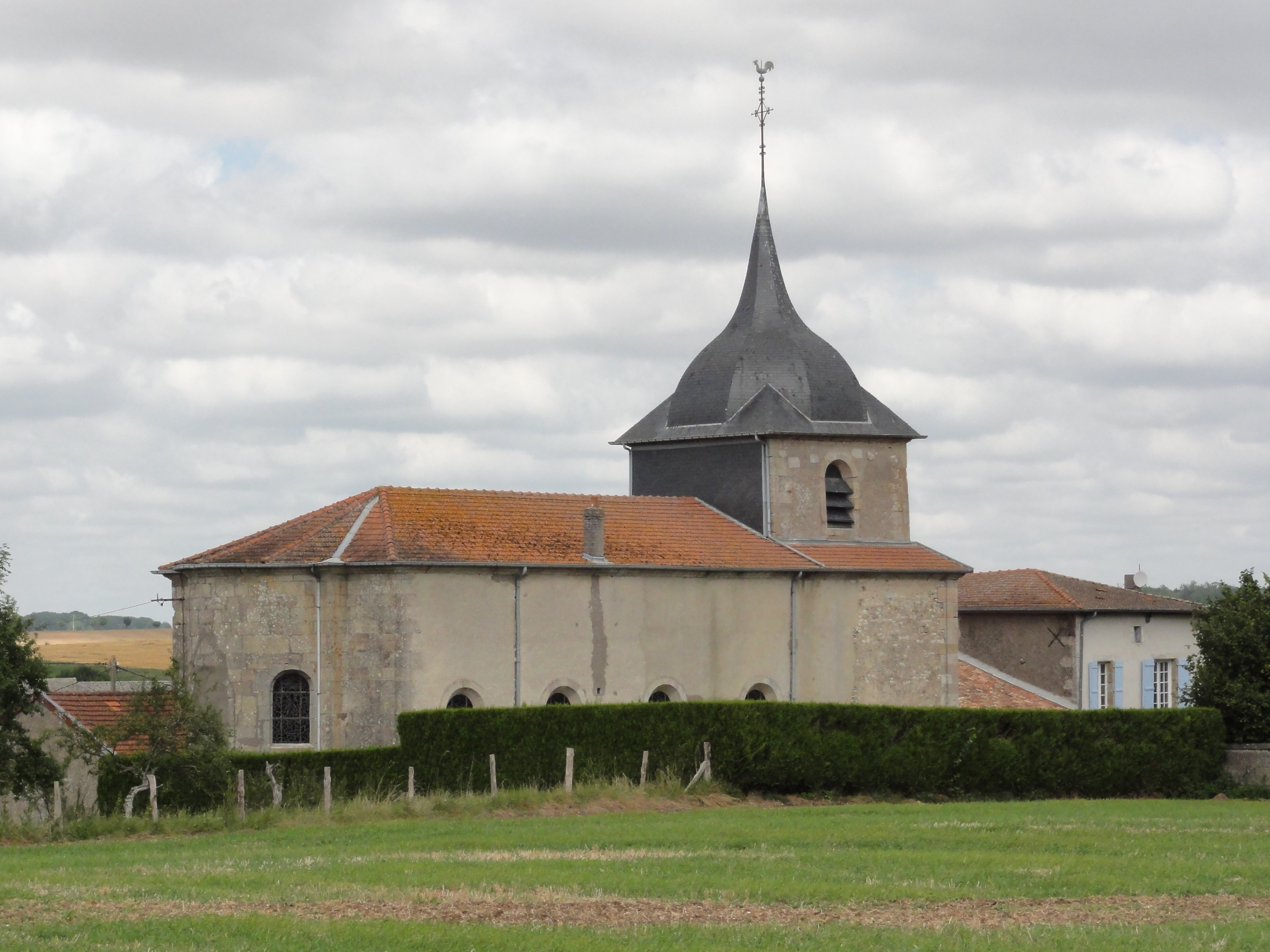 Gimécourt (Meuse) église